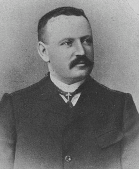 Poltred eus Glaoda ar Prad, tennet eus Marvailhou ar Vretoned e-tal an tan, 1907